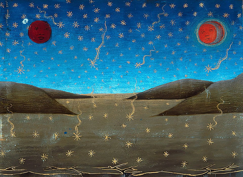 Miniatura da Storie di San Gioachino, Sant'Anna, di Maria Vergine, di Gesù, del Battista e della fine del mondo (1476), realizzate per Galeazzo Maria Sforza, oggi situate nella Biblioteca nazionale di Torino